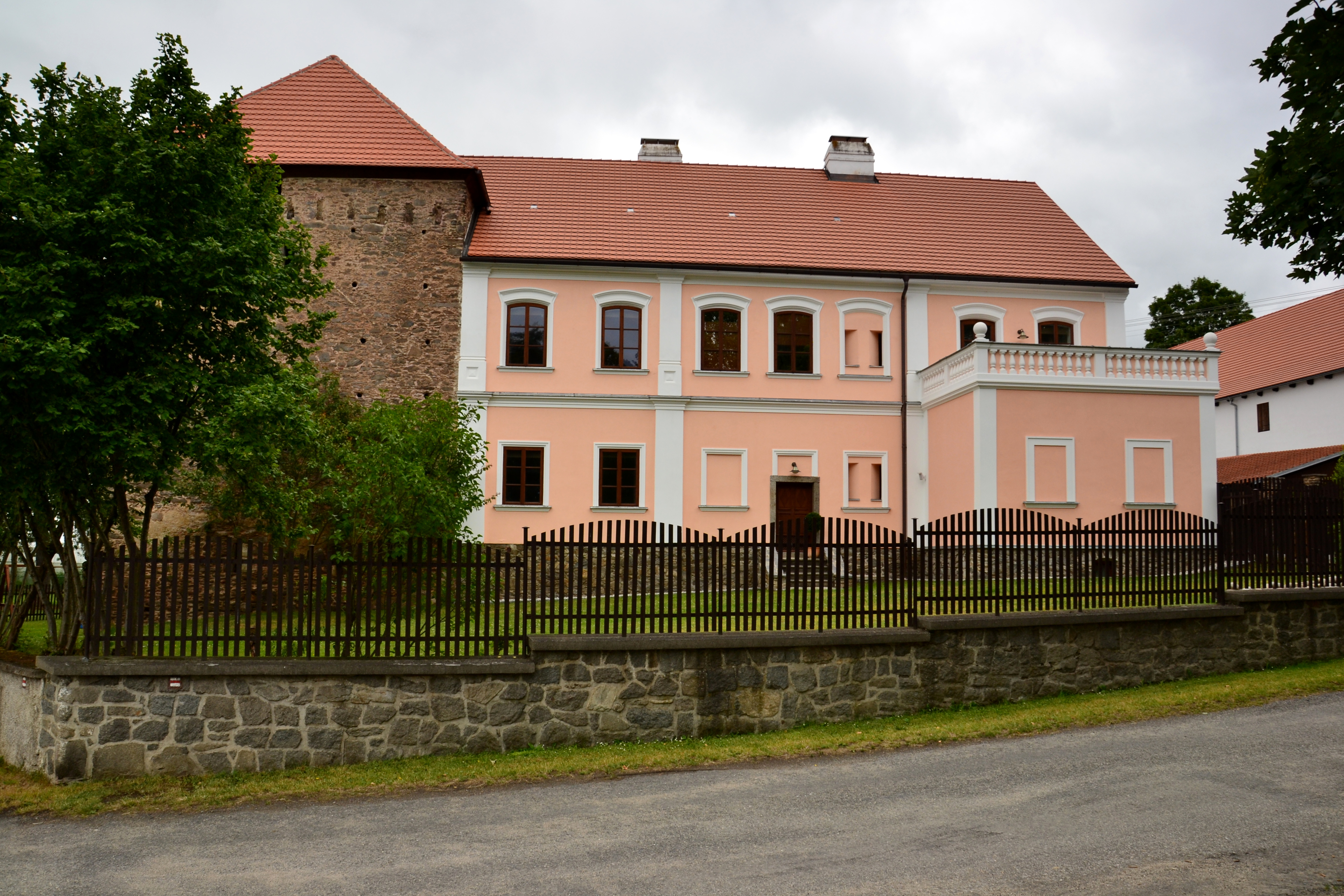 Tvrz, Svojšice 11, Svojšice (Petrovice u Sušice).